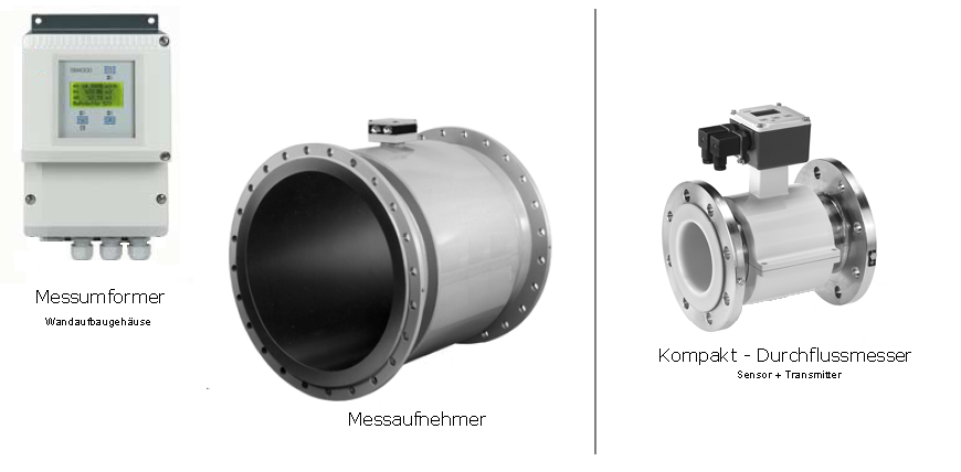 MID Durchflussmesser Messstelle (Kompakt- und Normalversion)